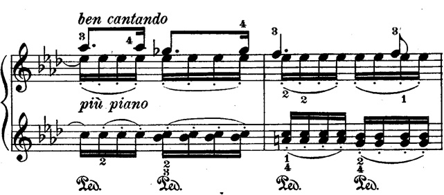 Ein Ausschnitt aus dem Andante der dritten Sonate von Brahms, gedacht zum Vergleich mit einem Ausschnitt aus dem Lied "Mondnacht" von Schumann.